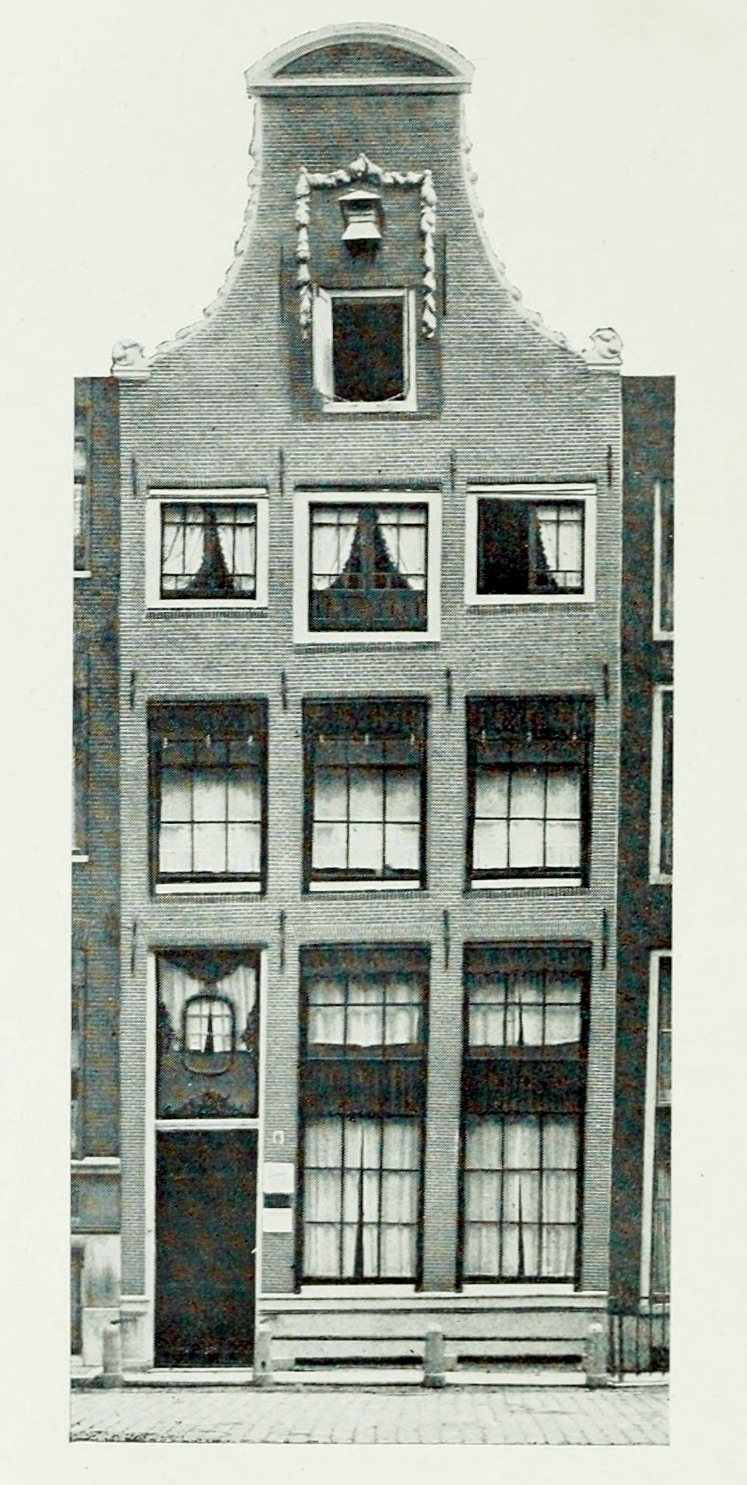 "Chez M. Thomas Sergeant in der Westerkerckstraet", aujourd'hui Westermarkt, 6.